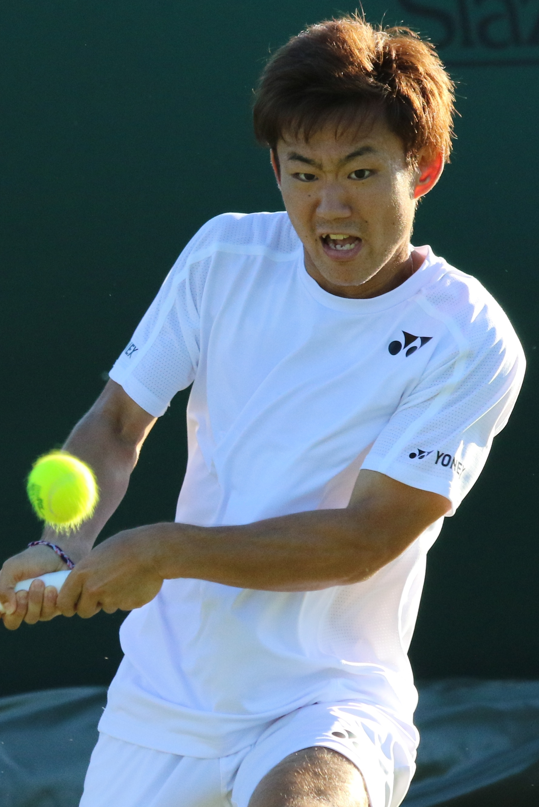 Nishioka WMQ16 (10)